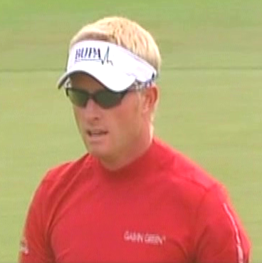 Bildbeschreibung: Simon Dyson bei den Austrian Open 2006 Quelle: eigene Aufnahme mit einer Handycam Fotograf/Zeichner: Boss 11:15, 13 June 2006 (UTC) Datum: 10.6.2006 Sonstiges: GNU